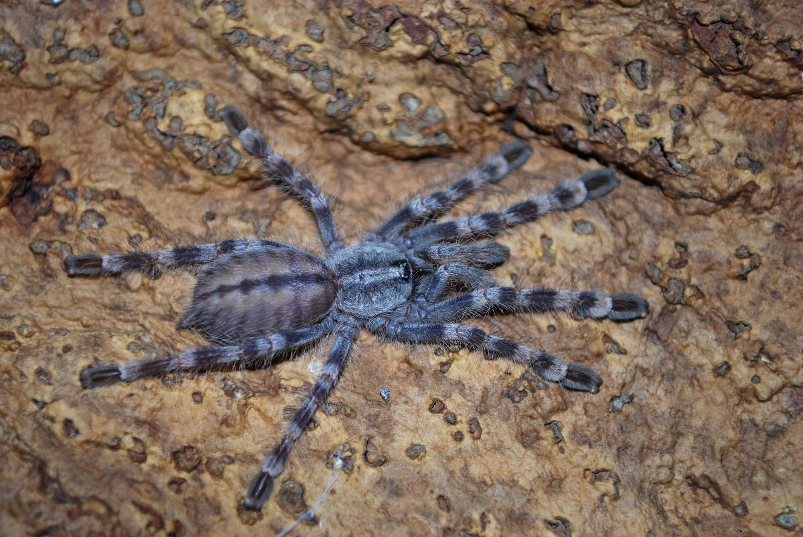 Poecilotheria formosa